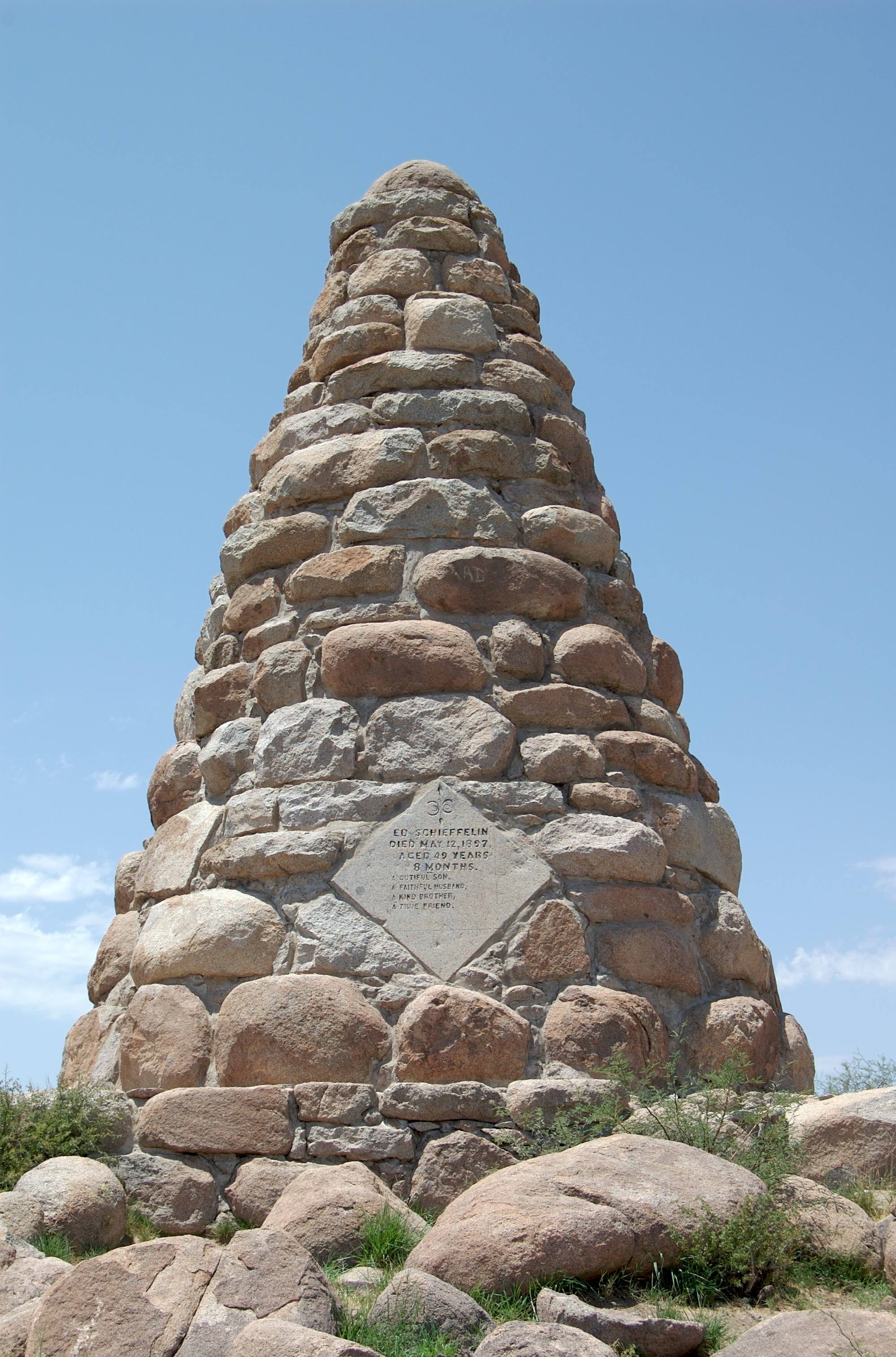 Ed Schieffelin Monument